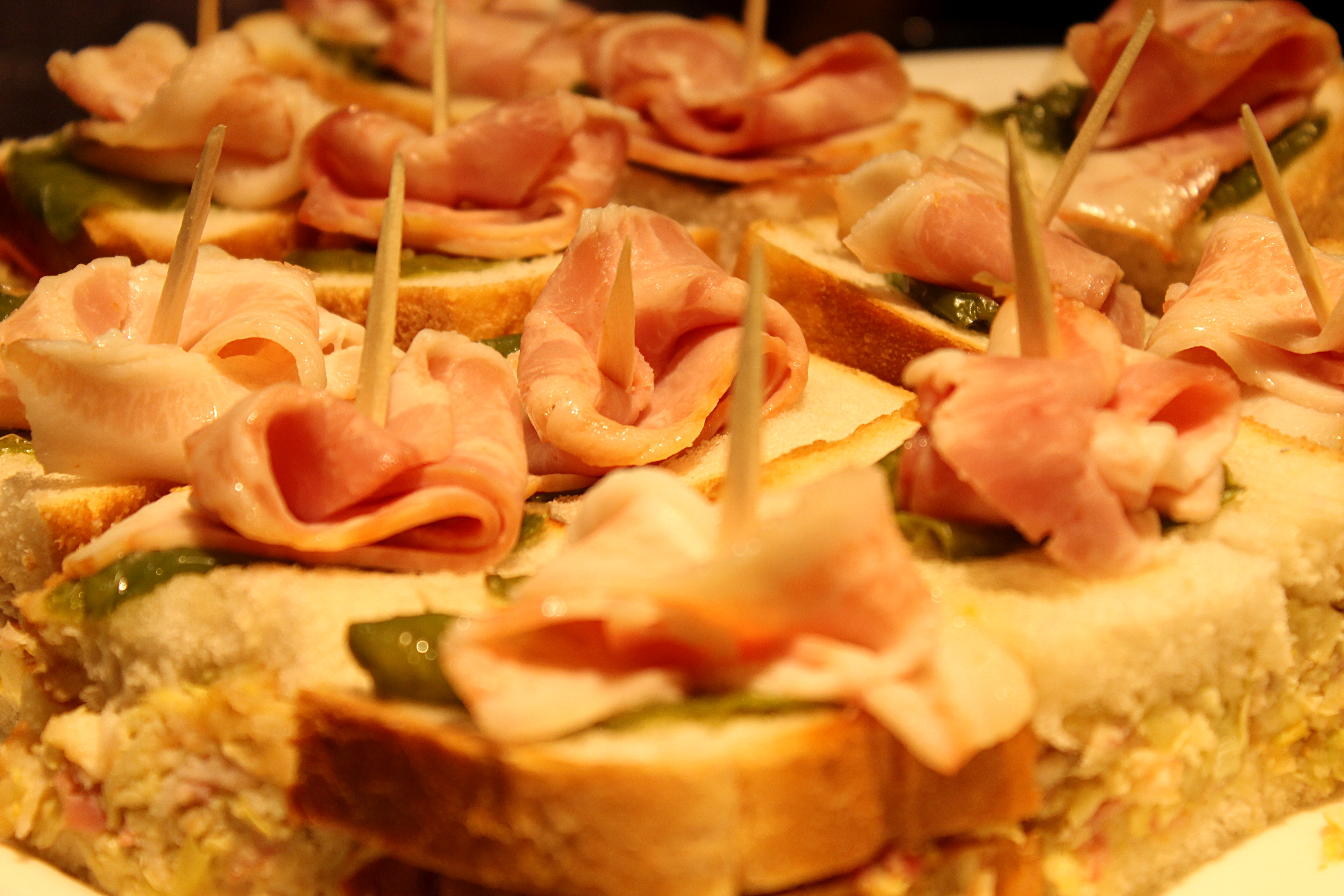 Parmi les trésors gastronomiques de Donostia figurent ses célèbres pintxos, ces miniatures culinaires allant de la traditionnelle tartine de pain aux créations raffinées de la haute cuisine.